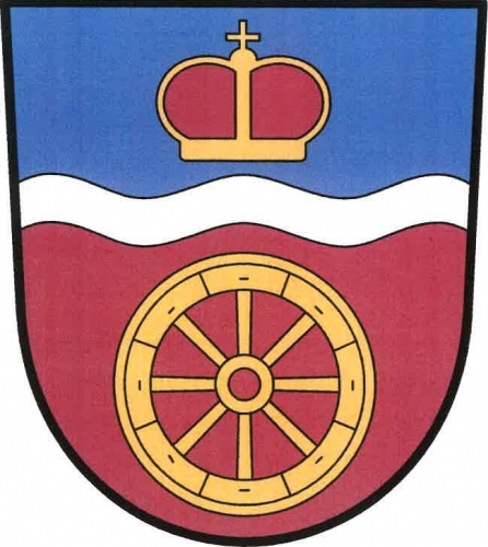 znak, Mikulovice, okres Pardubice